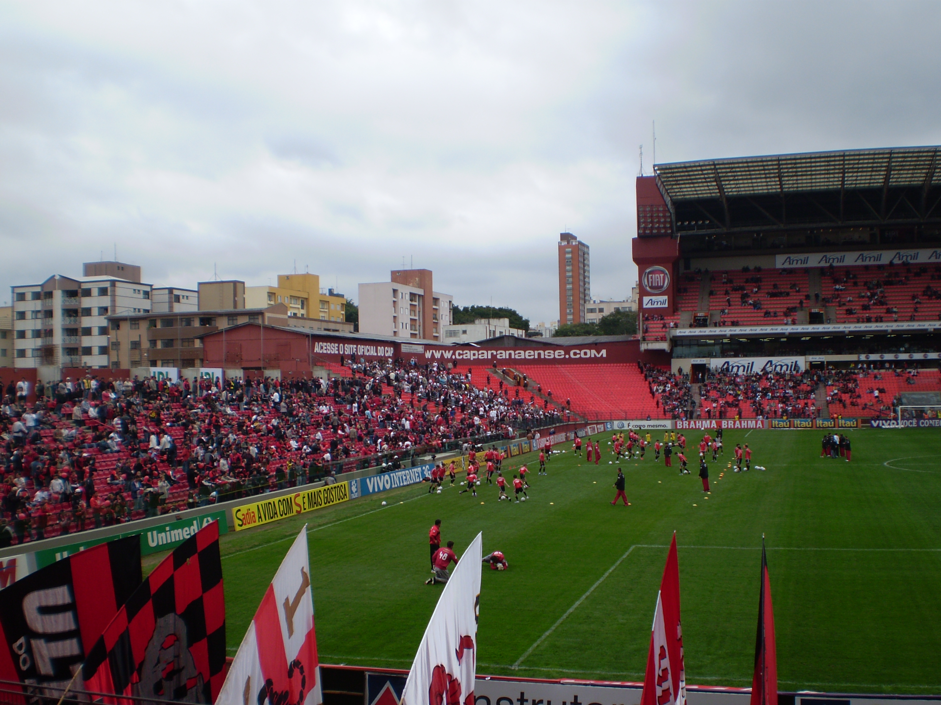 Arena da baixada - setor Brasilio Itibere